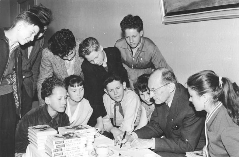 Berlin, Jugendstunde, Ludwig Renn Zentralbild Quasch. Qua-Pu-Qu 4.4.1959 Ludwig Renn sprach mit Teilnehmern an der Jugendweihe Der bekannte Schriftsteller Ludwig Renn empfing am 4. April 1959 in der Akademie der Künste zu Berlin 33 Jungen und Mädchen aus dem Kreis Oschatz. Diese Jugendlichen kamen in Vorbereitung der Jugendweihe nach Berlin. Im Klubsaal der Akademie gab Ludwig Renn den interessiert lauschenden Jugendlichen bereitwillig Auskunft auf all ihre Fragen. Im Mittelpunkt des lebhaften Gesprächs stand Renn´s Jugendbuch "Trini". UBz: Jedem der Teilnehmer an der Jugendstund überreicht Ludwig Renn ein Exemplar seines "Trini" mit einer Widmung.